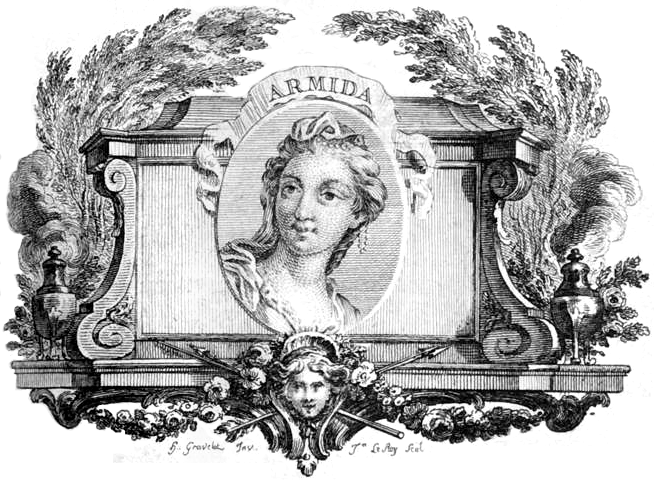 Immagine dal libro La Gerusalemme liberata, Agostino Delalain, Pietro Durand, Gio. Claudio Molini, Parigi, 1771